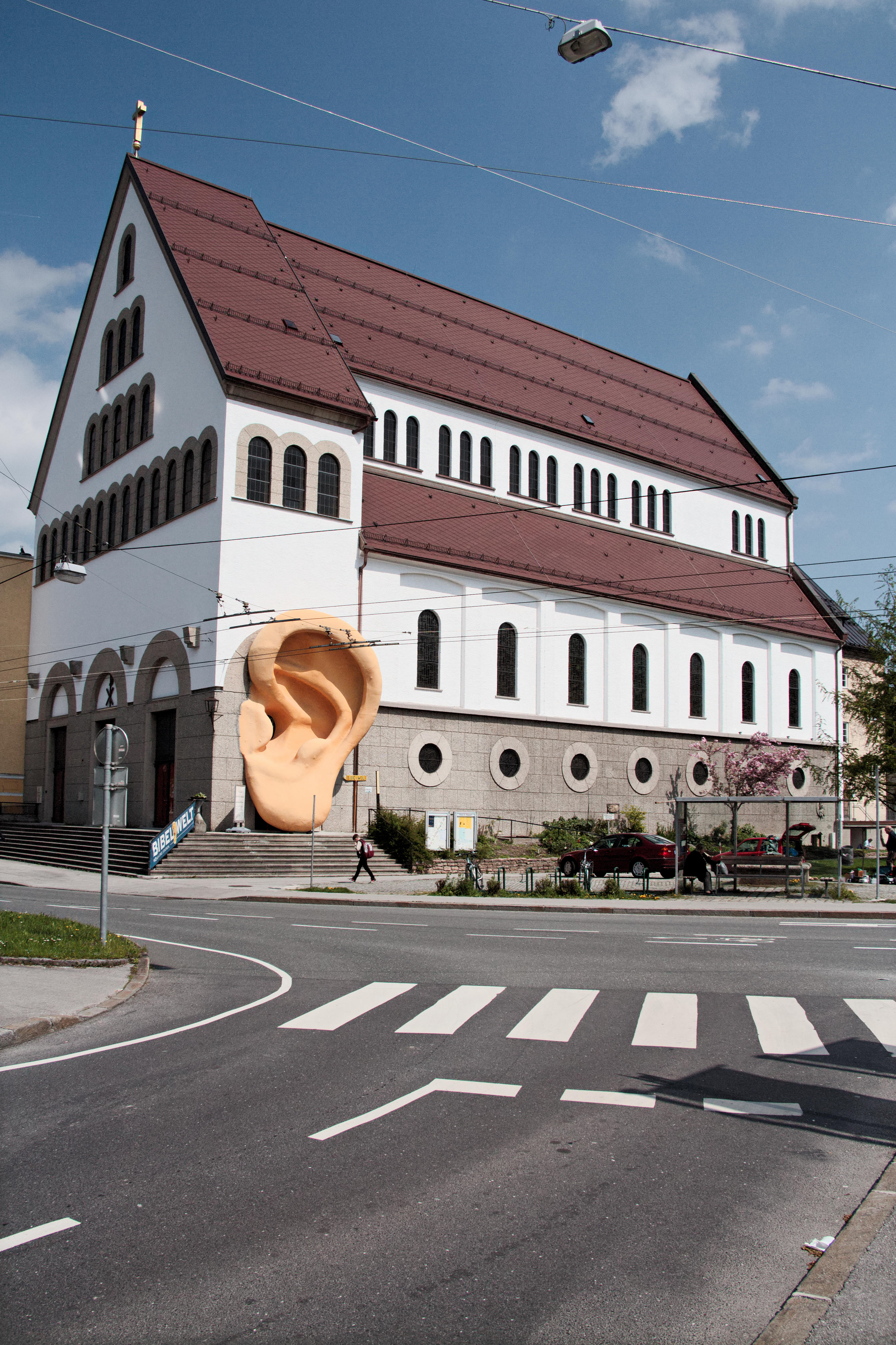 Pfarrkirche St. Elisabeth in der Salzburger Plainstraße